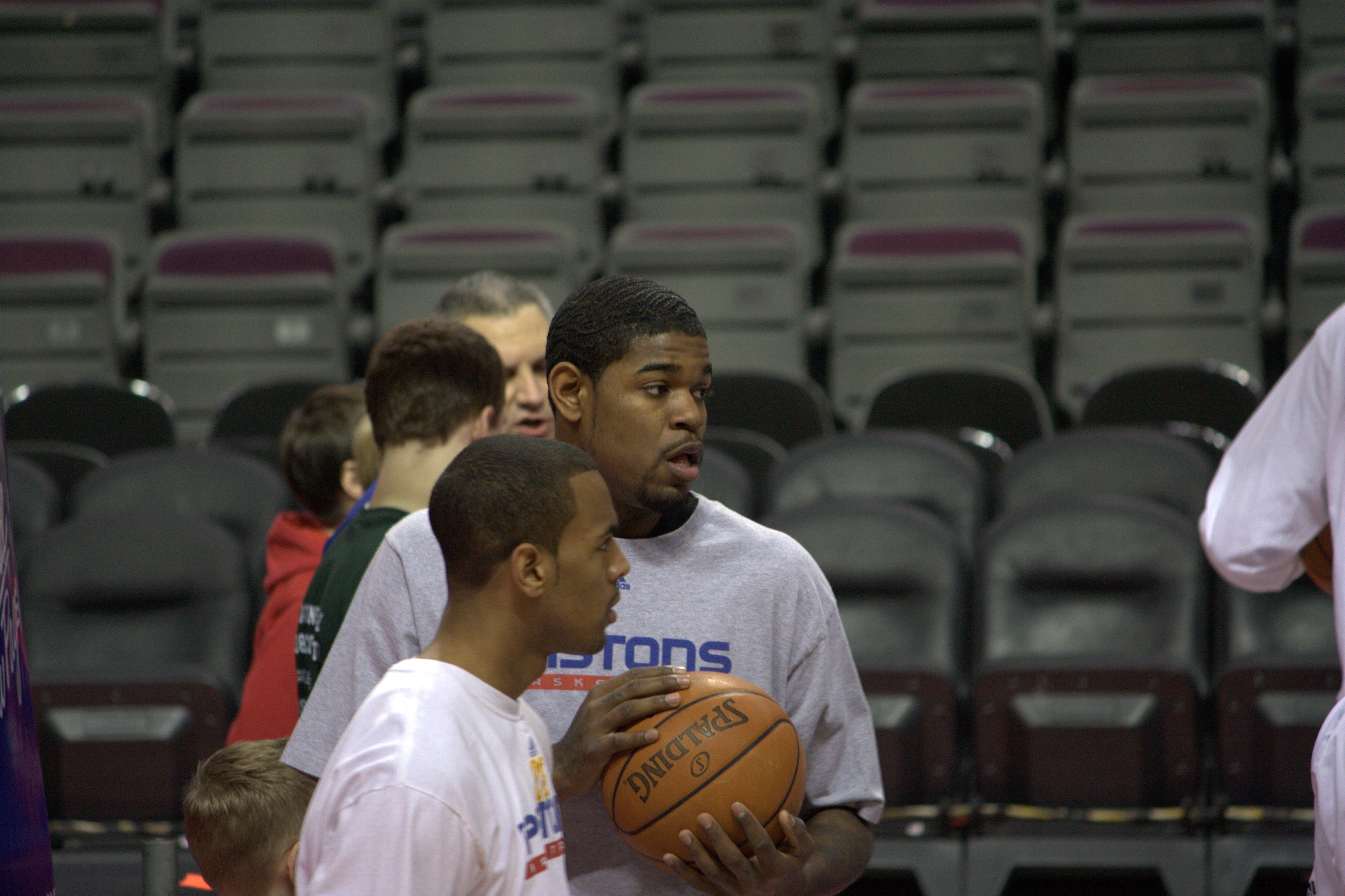 Amir Johnson.